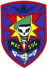 Badge non officiel du MACV-SOG.